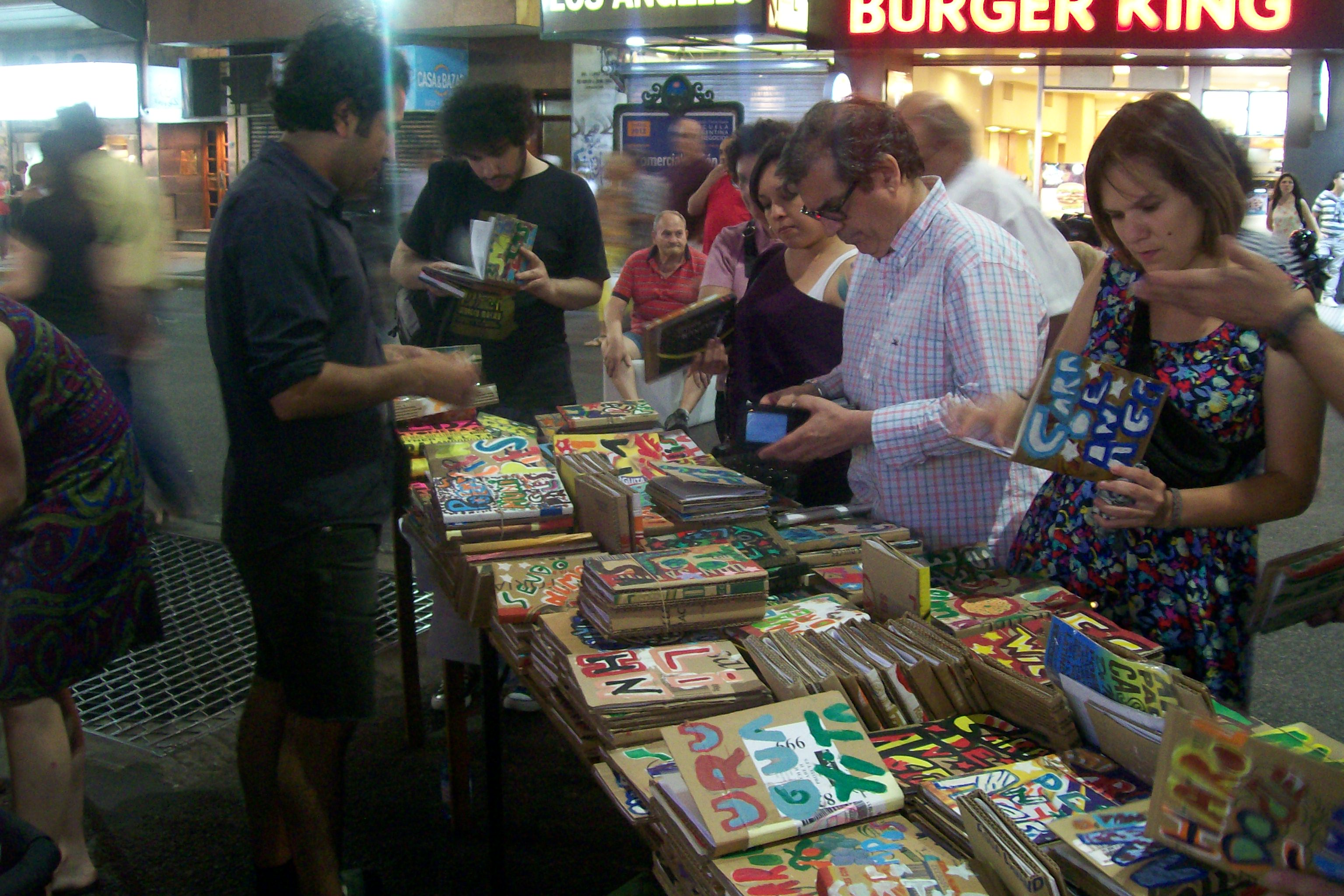 Libros de Eloísa Cartonera, Noche de las Librerías 2011